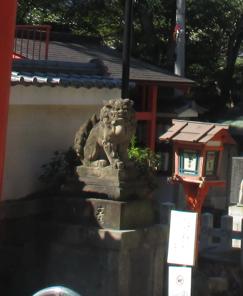 Хранитель храма Комаину